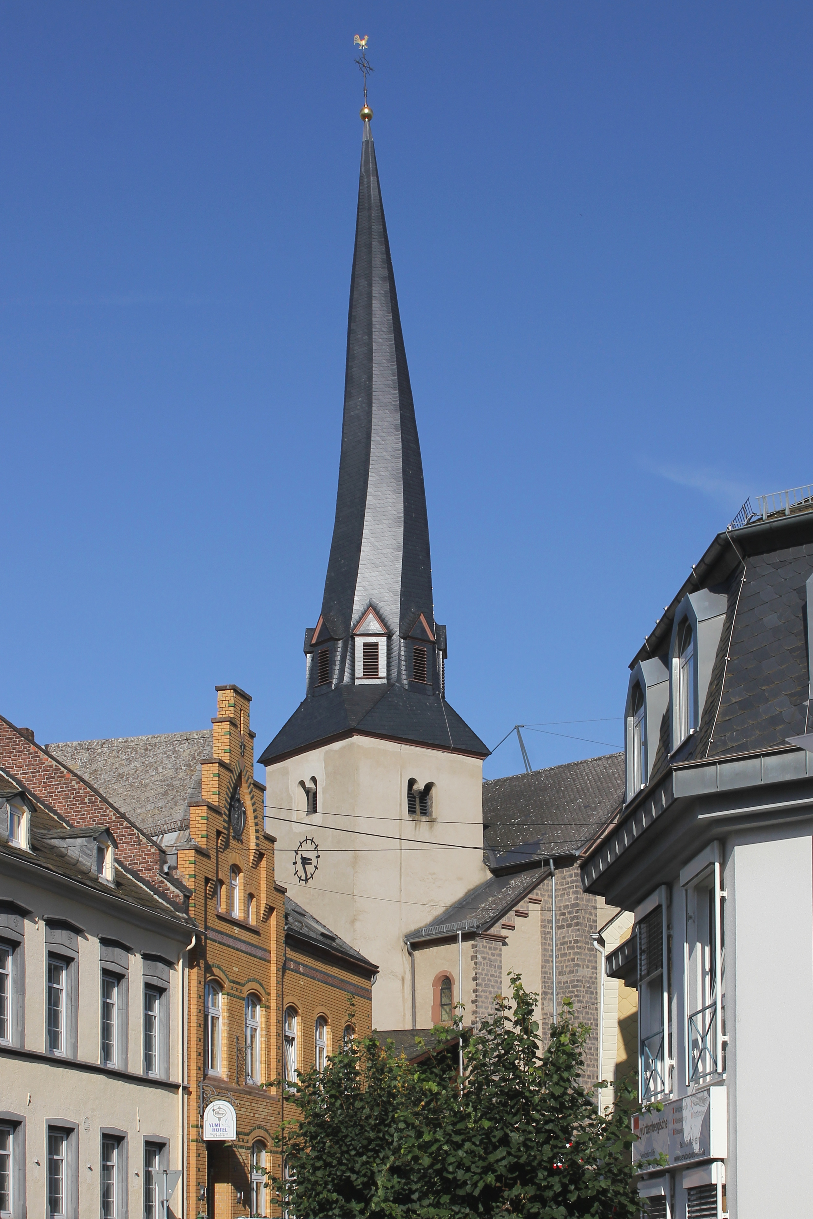 Glockenturm der Pfarrkirche St. Pankratius in Kaisersesch, erbaut im frühen 14. Jahrhundert und in den Neubau von 1899/1900 einbezogen. Die Konstruktionshölzer des etwa 24 Meter hohen Turmhelms sackten zusammen, wodurch die auffällige Drehung entstand. Diese ursprünglich durch einen Konstruktionsfehler entstandene typische Form wurde 2014 bei der Erneuerung des Turmdachstuhls originalgetreu rekonstruiert.